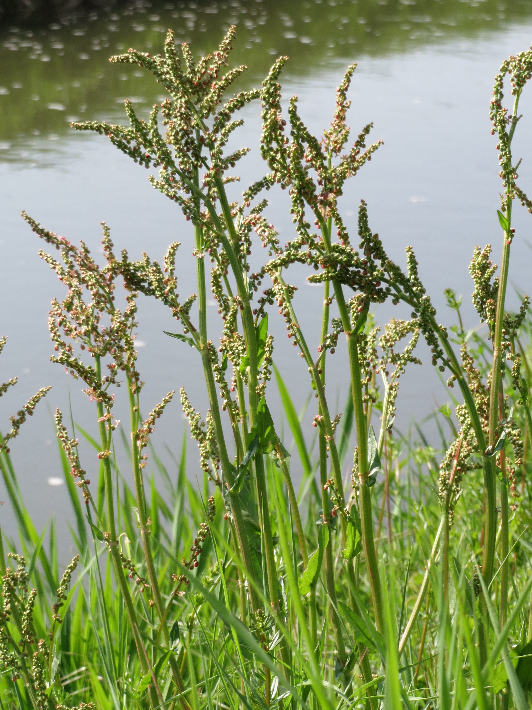 Wiesen-Sauerampfer (Rumex acetosa) am Kraichbach bei Hockenheim